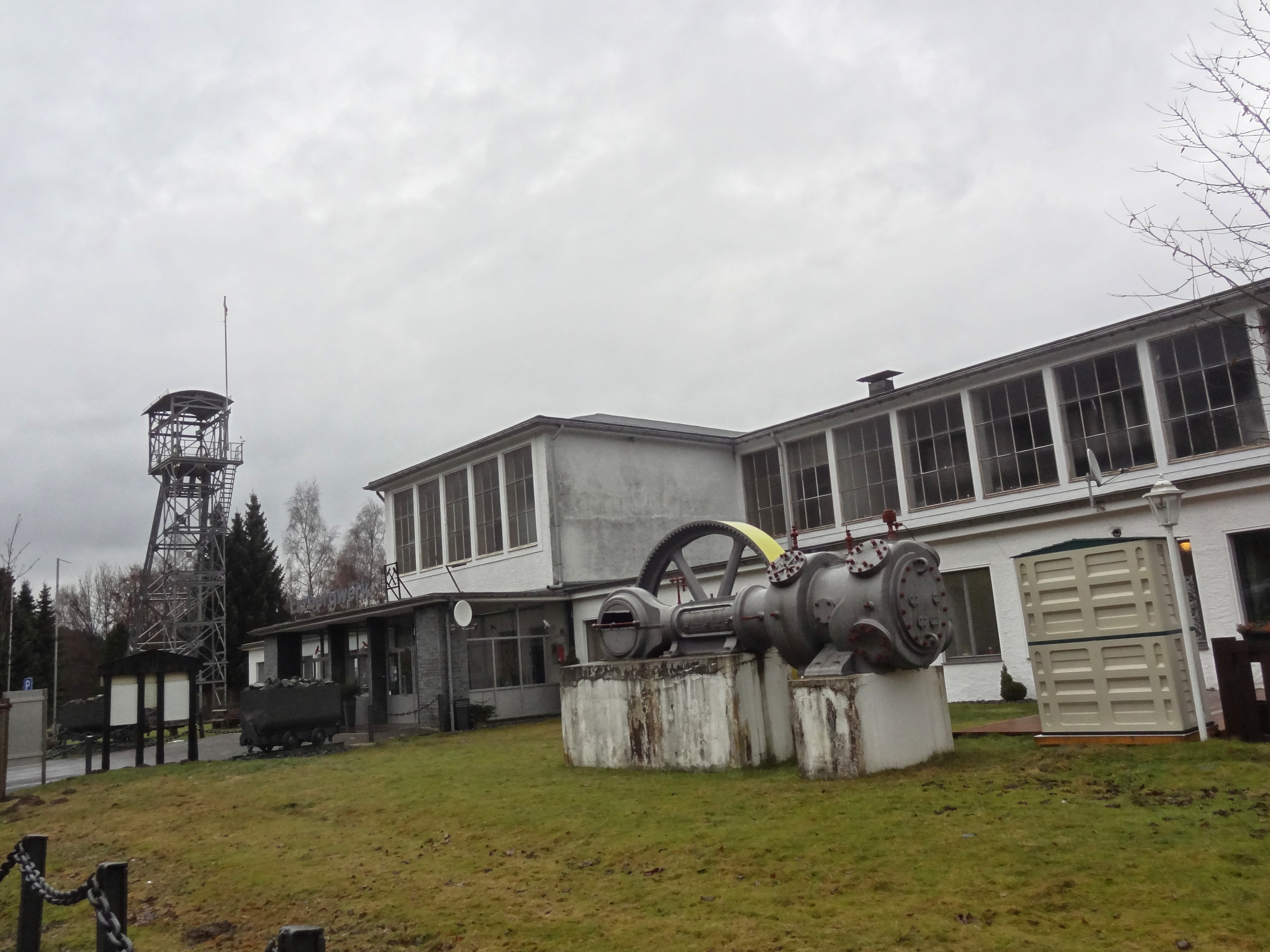 Erzbergwerk Ramsbeck, Berbaumuseum